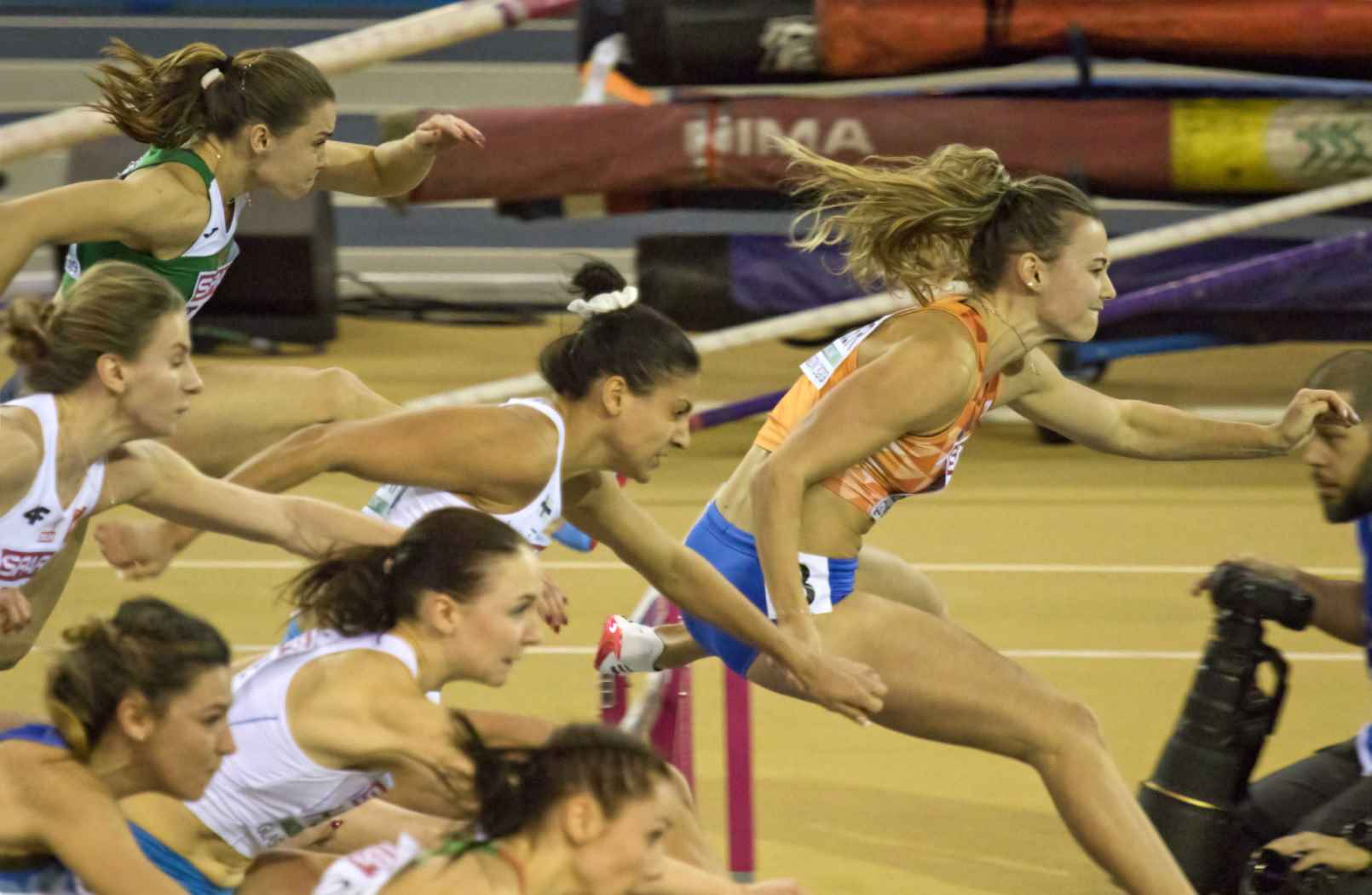 EKI30111 halve finale 60mH visser